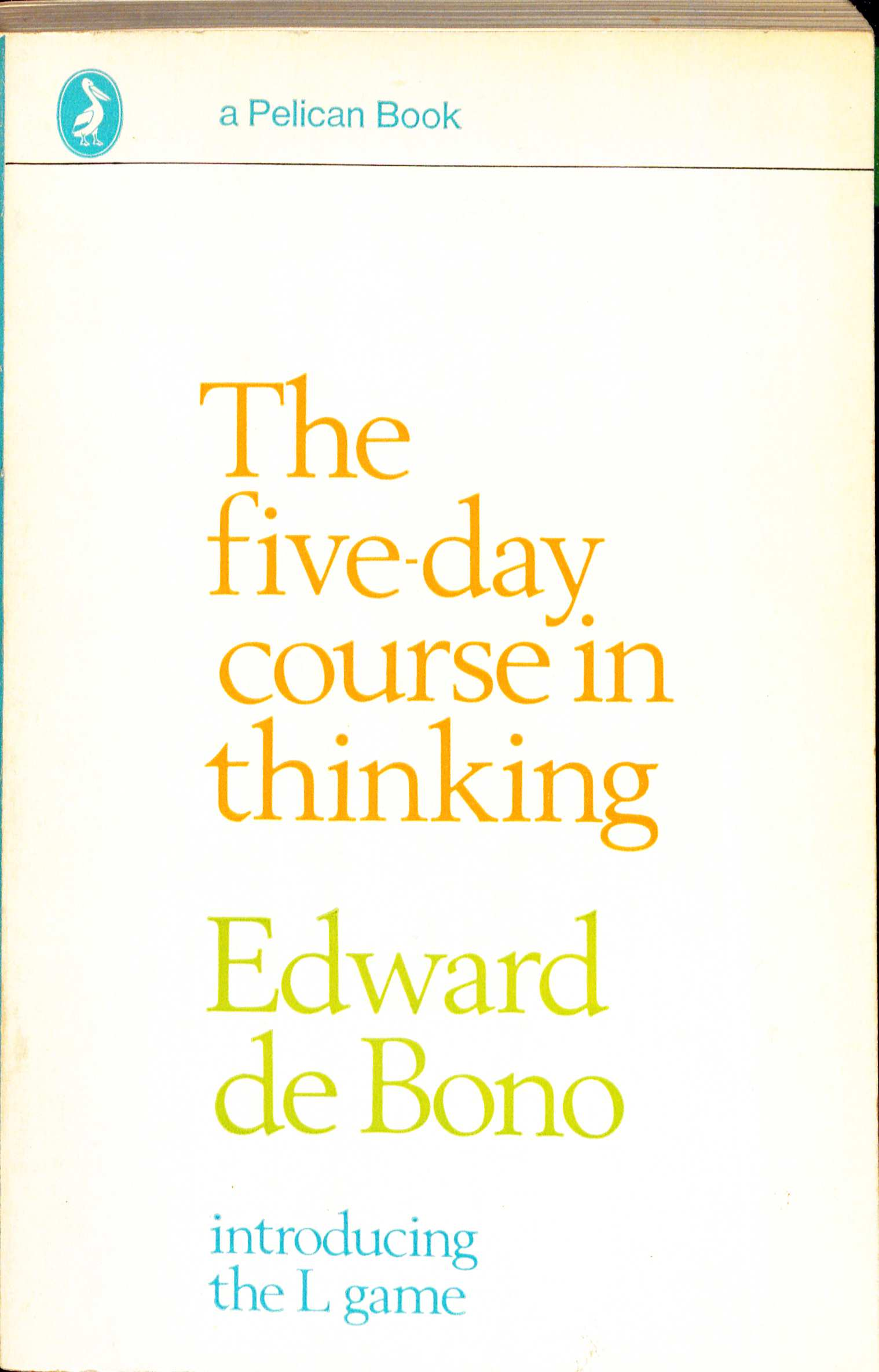 Edward de Bono The five day course in thinking 1970 cover